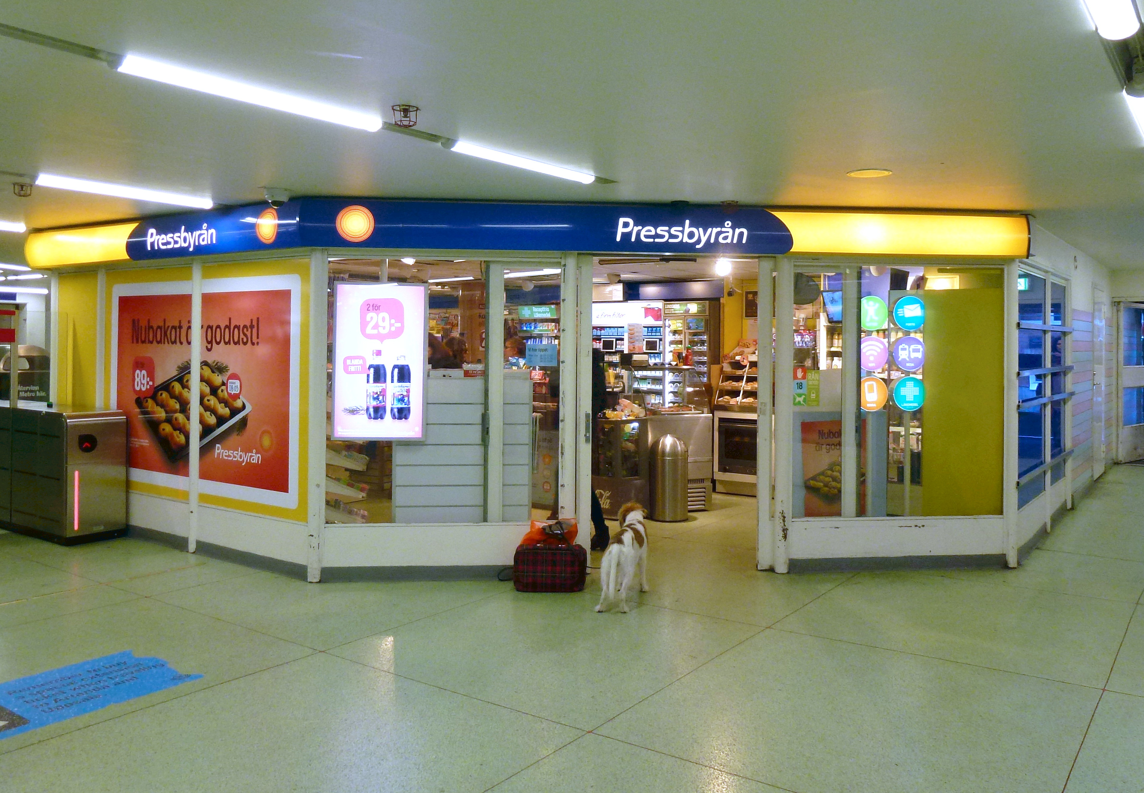 Stockholms södra station, Pressbyrån